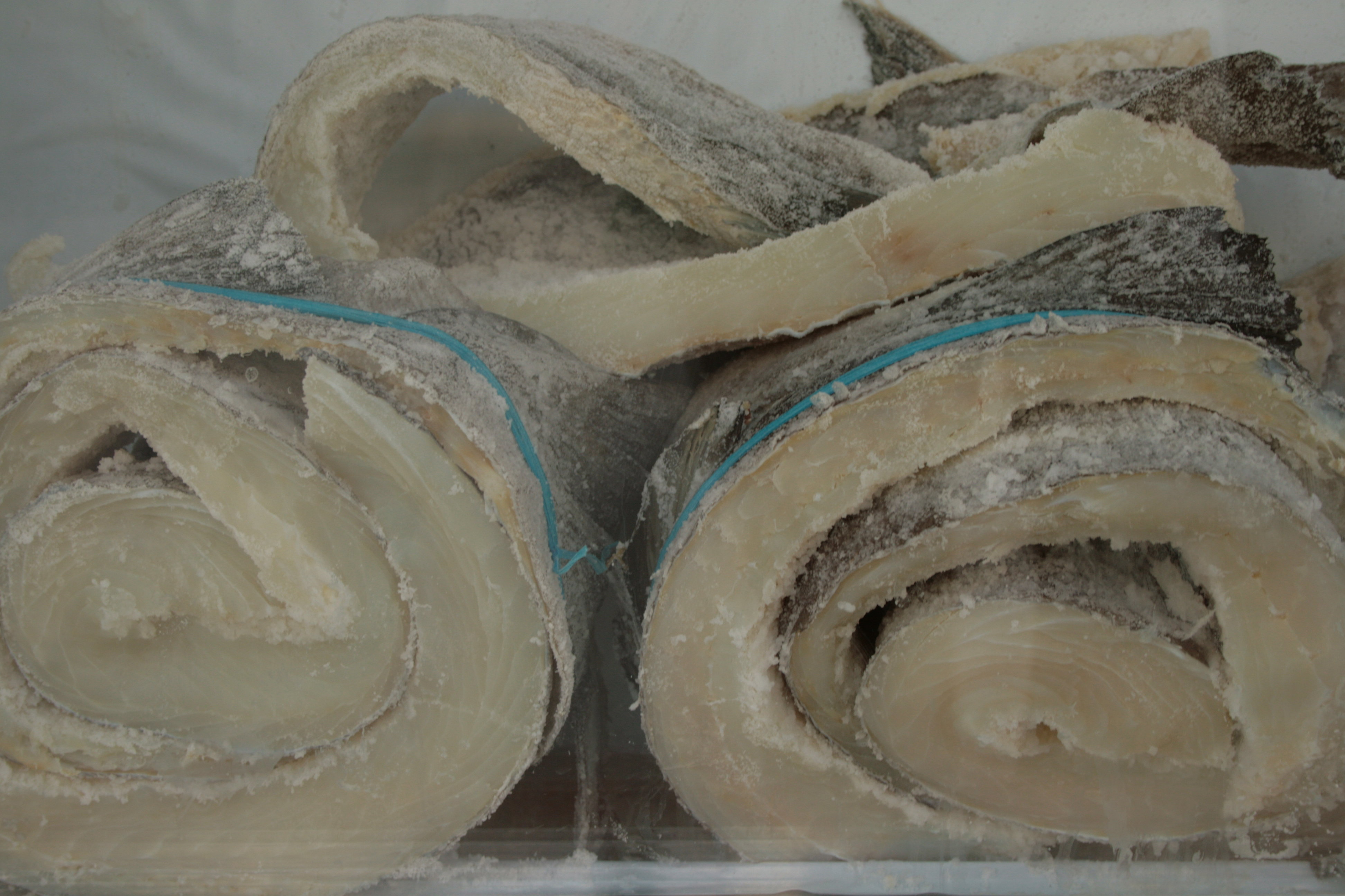 Bacalo en Salazón (Málaga)